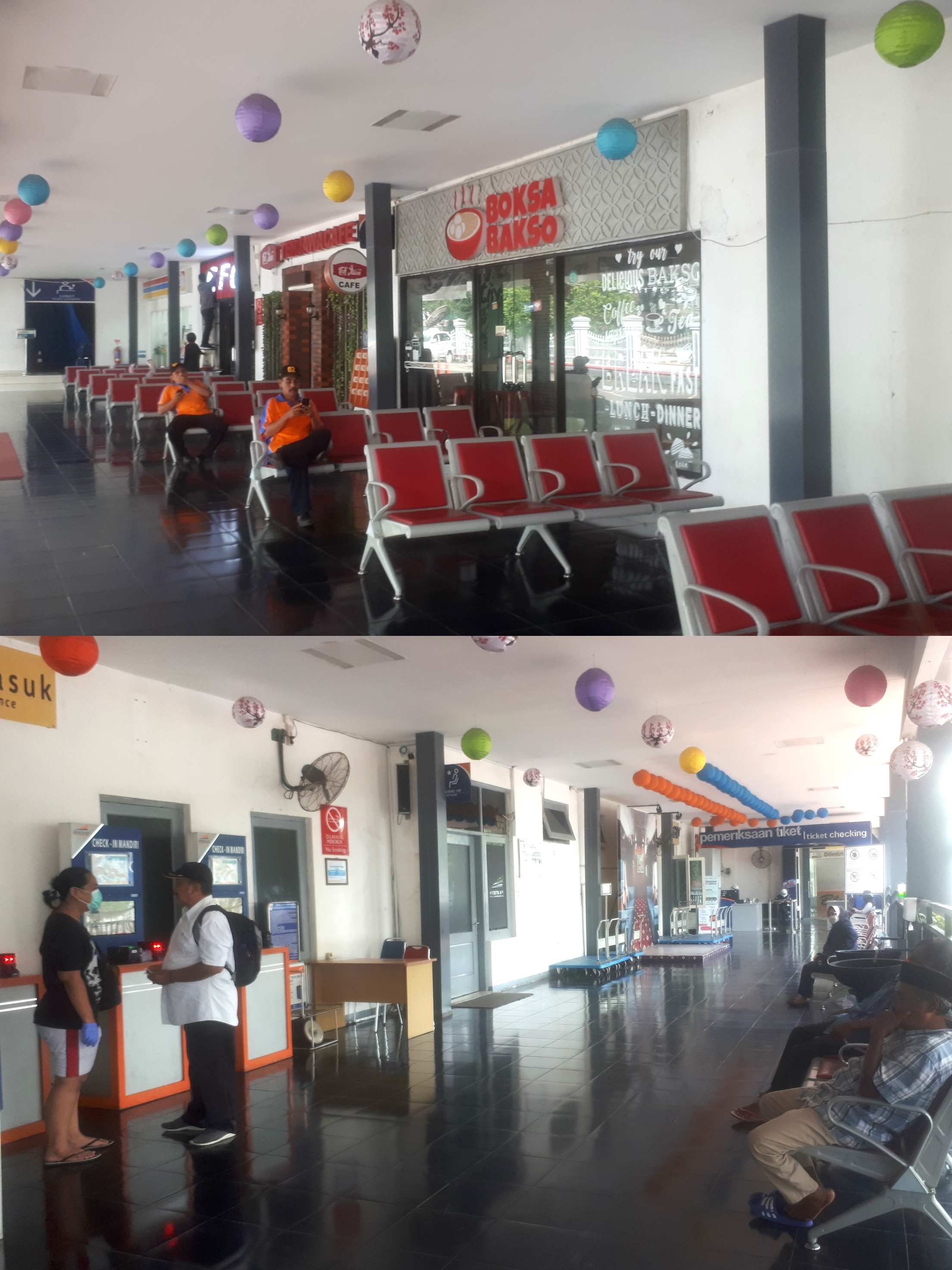 Suasana ruang tunggu Stasiun Madiun saat pandemi virus korona 2019, banyaknya pembatalan perjalanan kereta api menyebabkan beberapa stasiun terlihat sepi